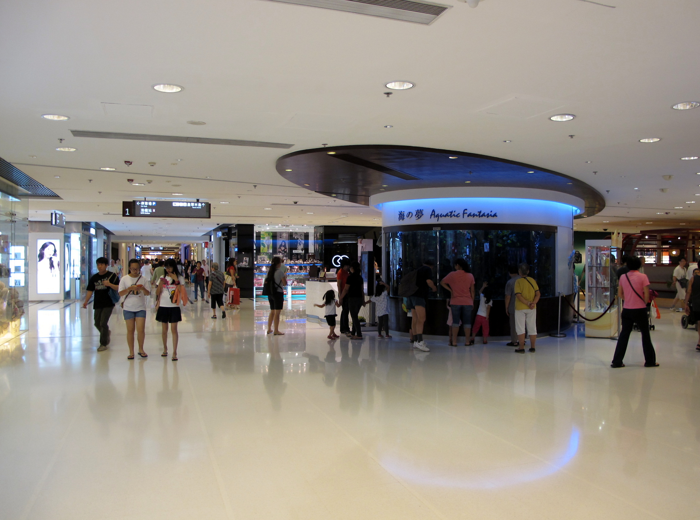 Maritime Square Aquatic Fantaria